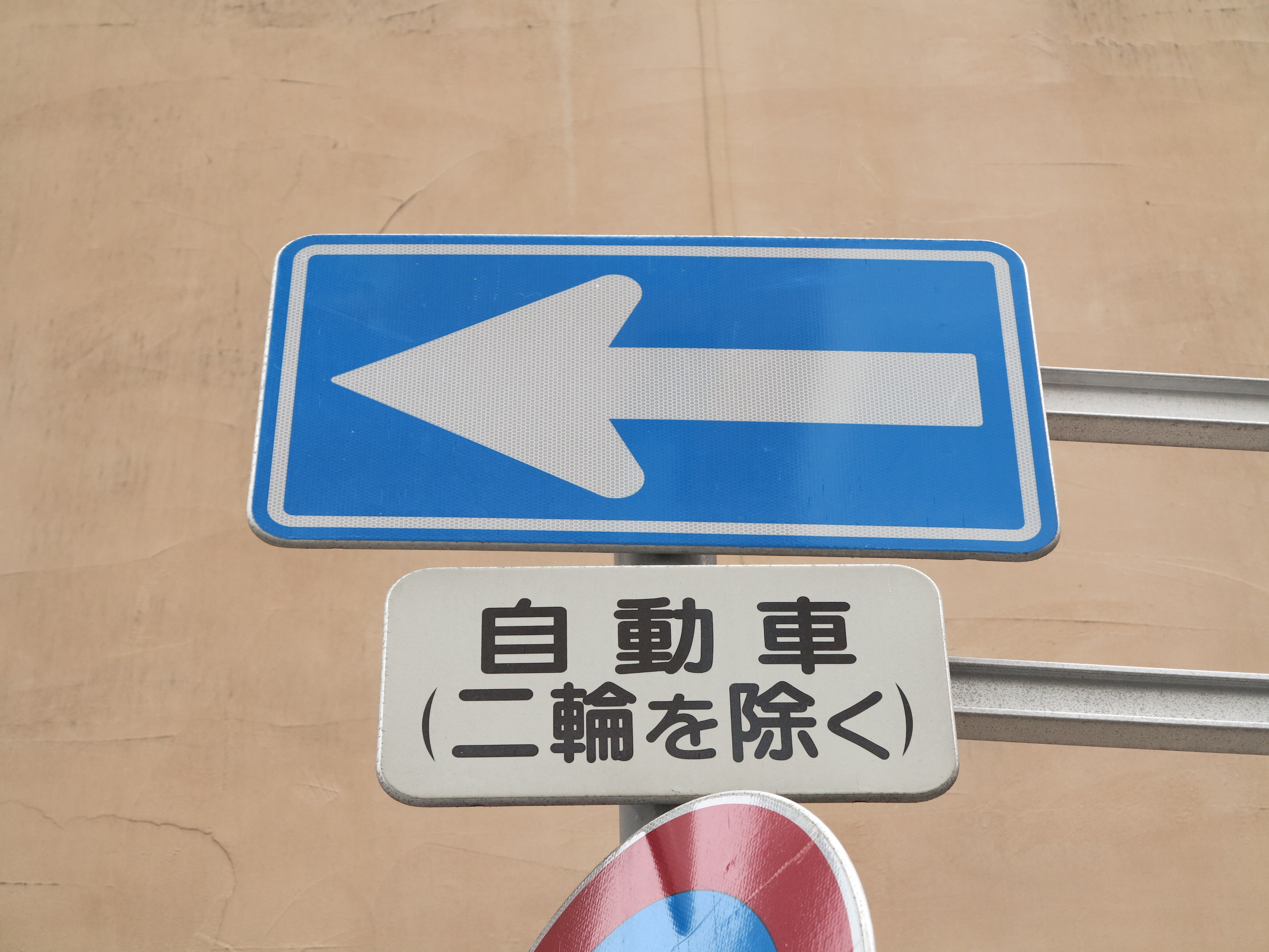 二輪を除外した一方通行標識（香川県高松市）